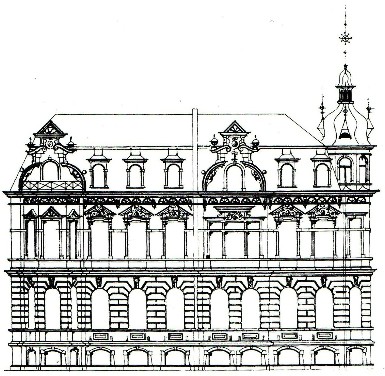 Doppelvilla Balg, Kaiser-Friedrich-Straße 8/10, Bonn-Gronau: Aufriss (Bauzeichnung) der Straßenfront 1898 nach Heinrich Schmitt